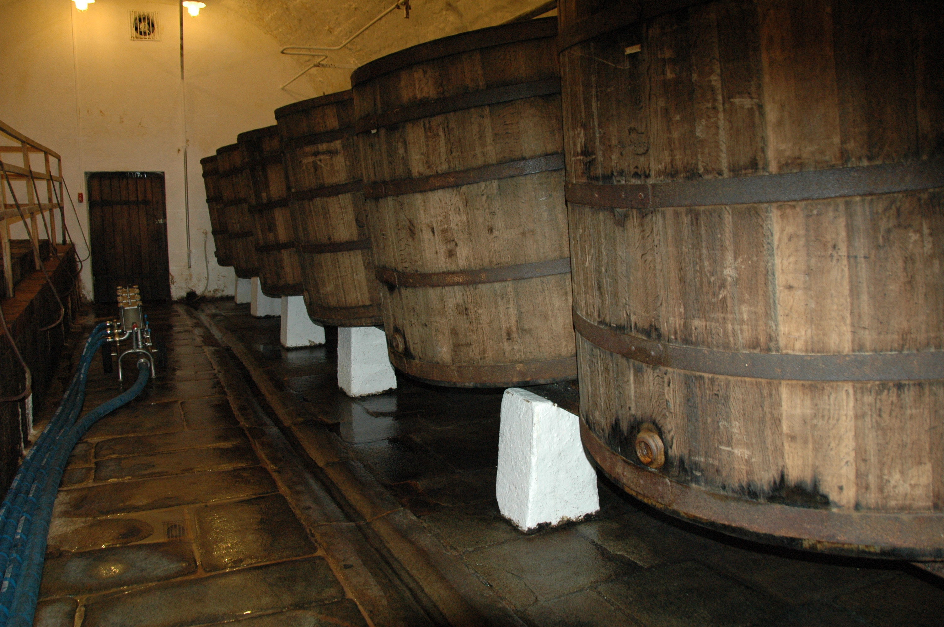 Pilsen, deel kelder PilsnerUrquell Categorie:Wikipedia:Afbeeldingen/Gebruiker:P.H. Louw